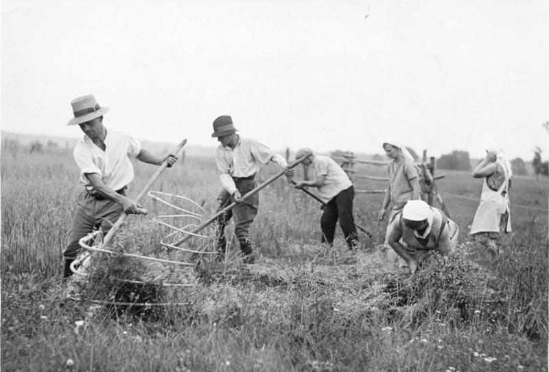 Zentralbild Hafermahd bei Lübben [im Spreewald] 1931